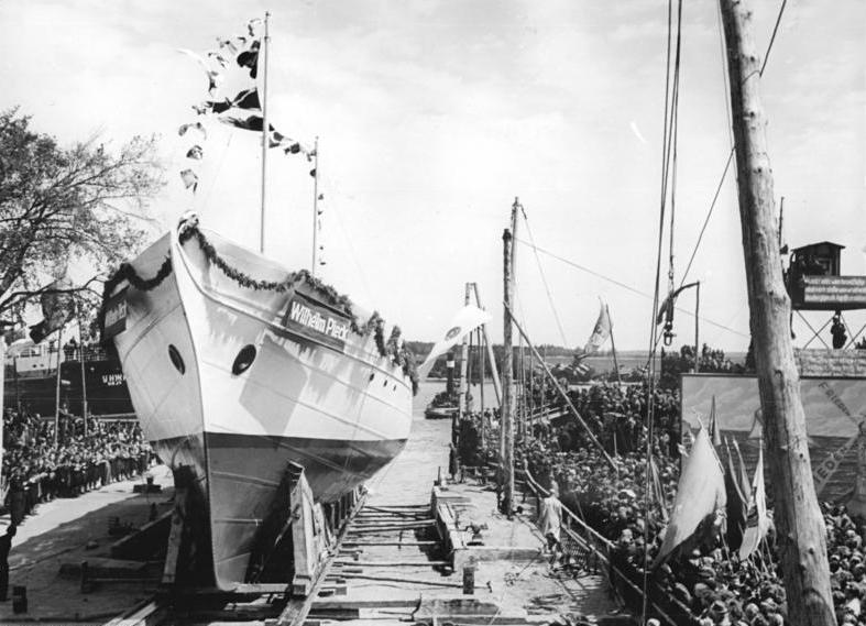 Warnemünde, Segelschulschiff "Wilhelm Pieck", Stapellauf Zentralbild Heilig Gr-Qu 27.5.51 Stapellauf des Schulschiffes "Wilhelm Pieck" auf der Warnow-Werft in Warnemünde im Beisein von Präsident Pieck am 26.5.51. UBz: Das Schulschiff "Wilhelm Pieck" läuft vom Stapel.